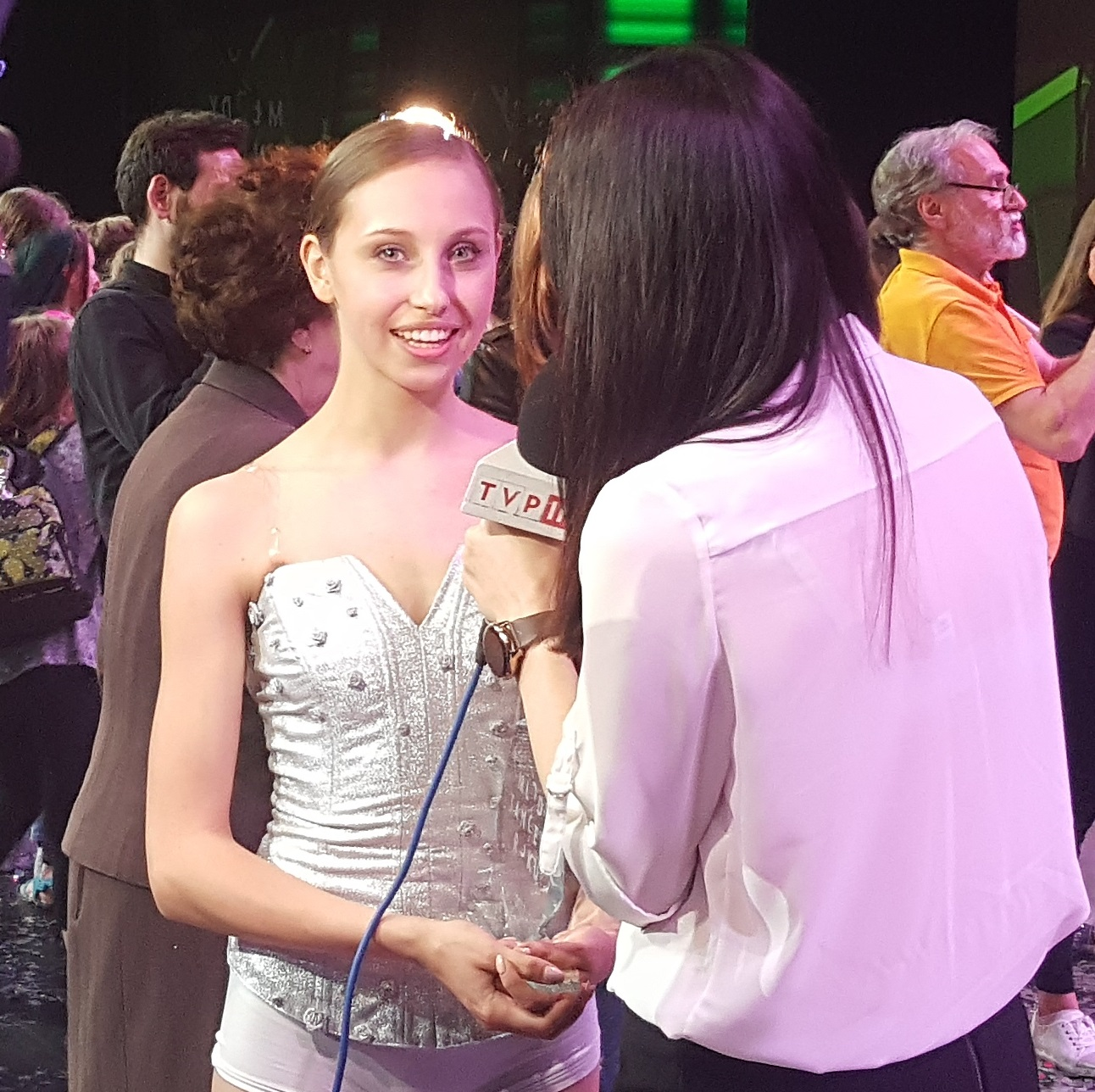 Polska tancerka Paulina Bidzińska w maju 2017 roku